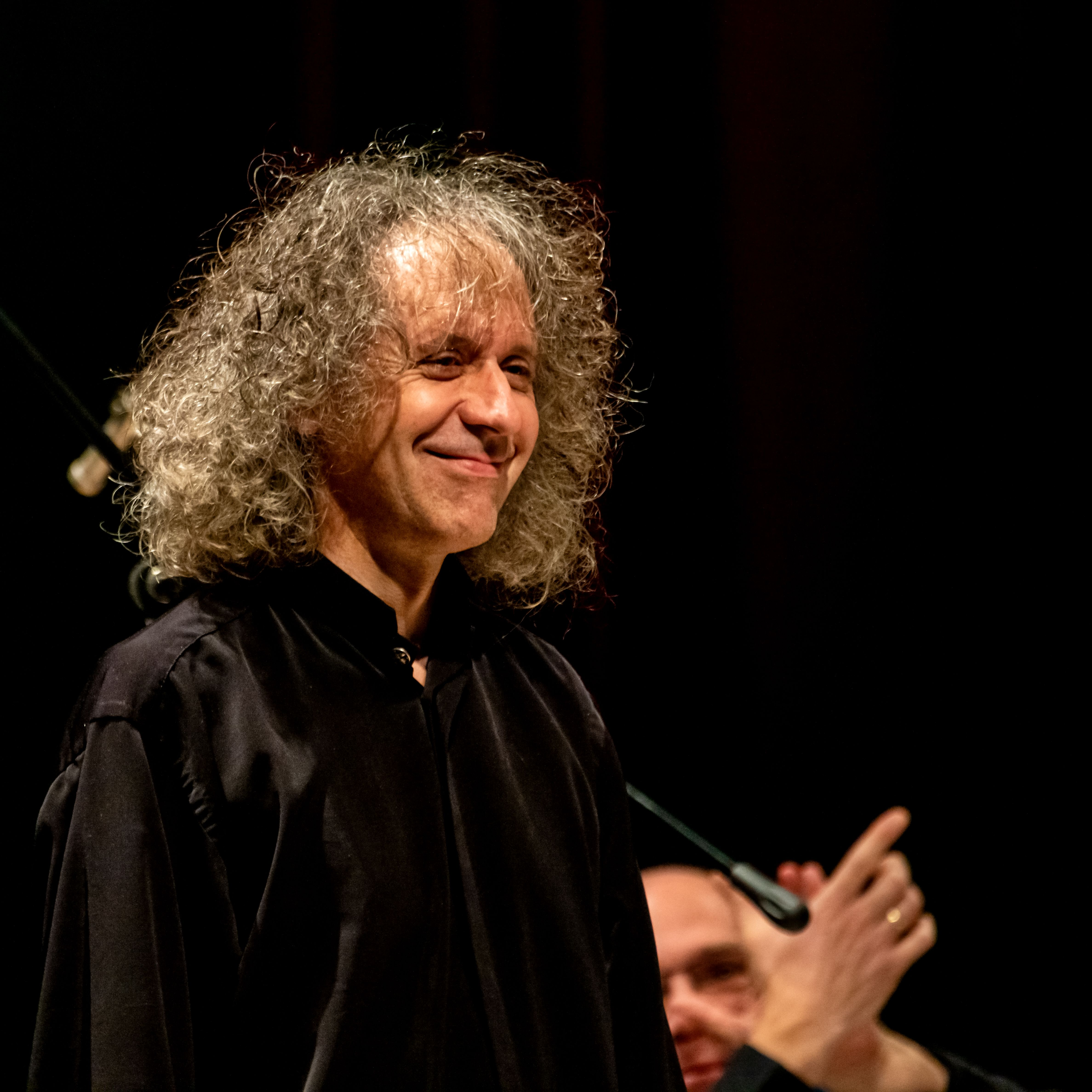 Konzert "Jeux Doubles" des Freiburger Akkordeon Orchesters im Forum Merzhausen am 15. 12. 2018 mit den Solisten Jean Lous Matinier Akkordeon und Michael Riessler Bassklarinette